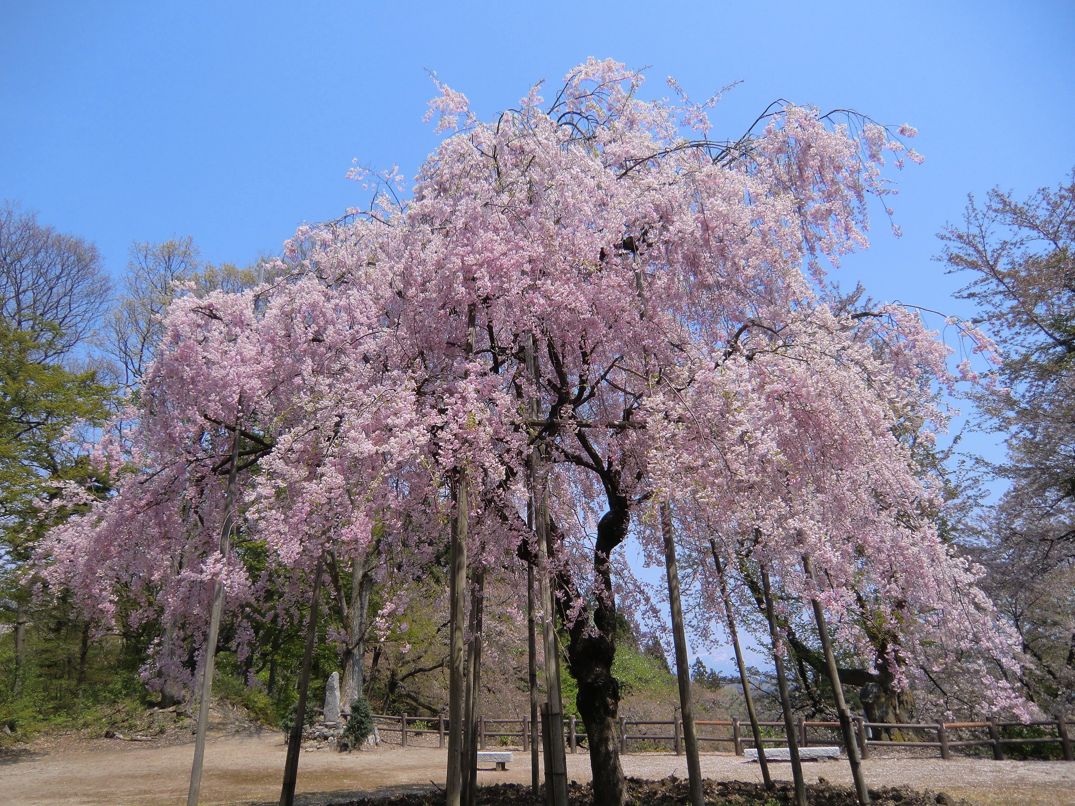 見附市観音山のしだれ桜です。